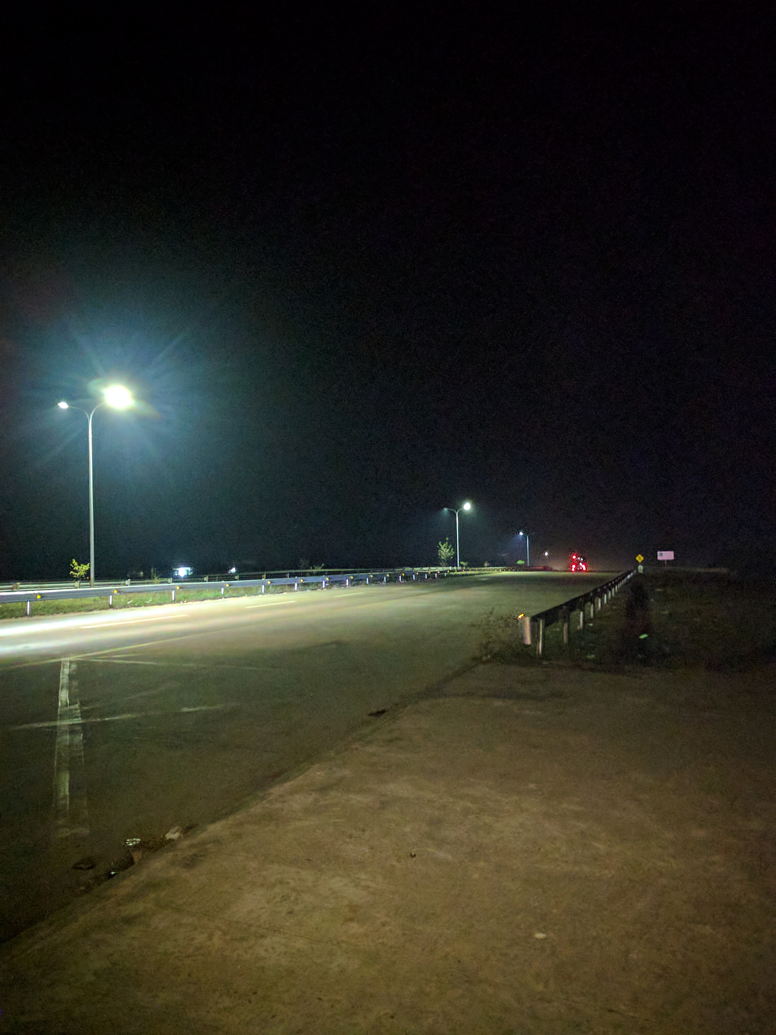 မြန်မာဘာသာ: ရန်ကုန် - မန္တလေး အမြန်လမ်းမ ညဘက်မြင်ကွင်း